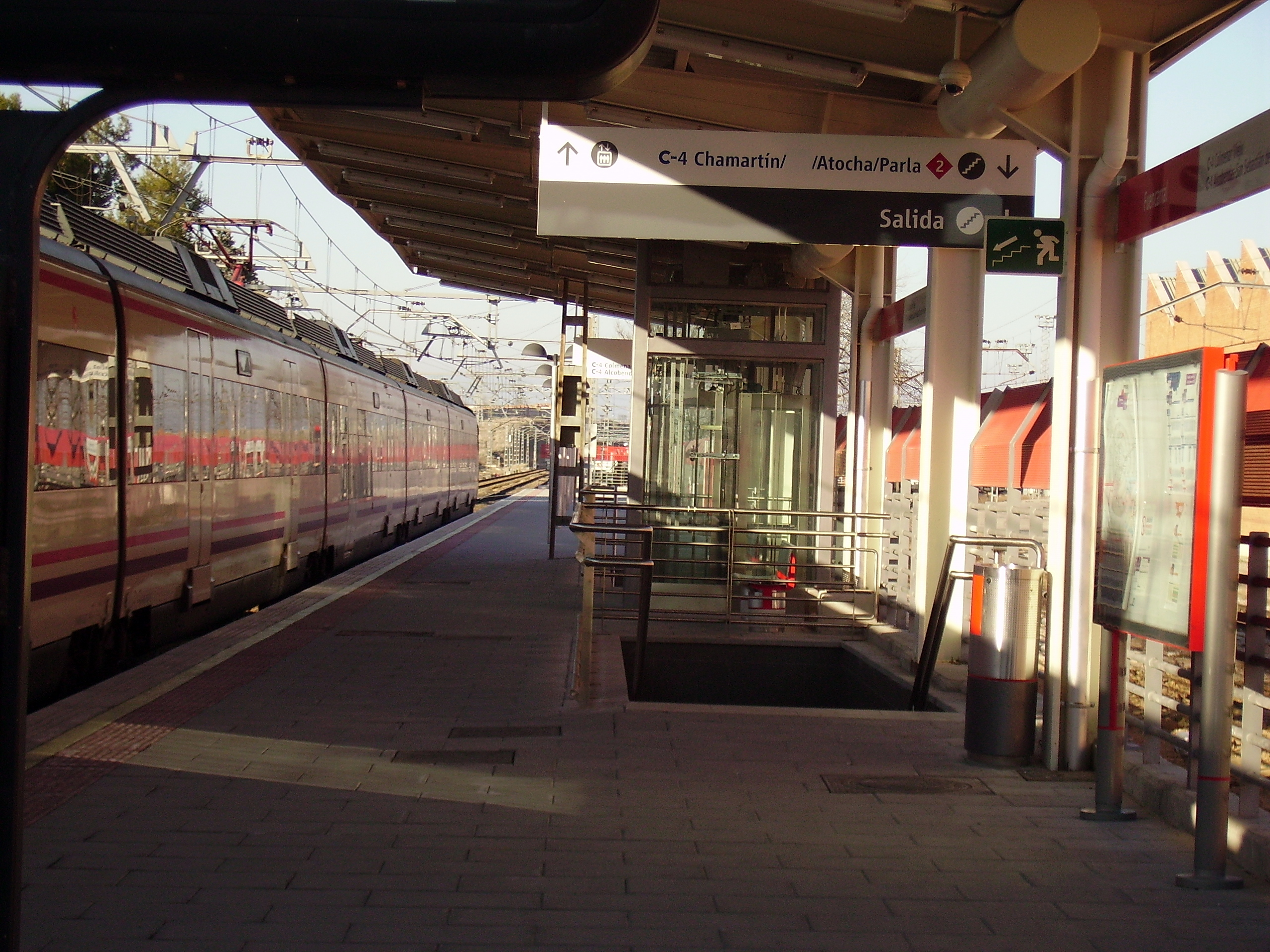 Valverde, Madrid, Spain